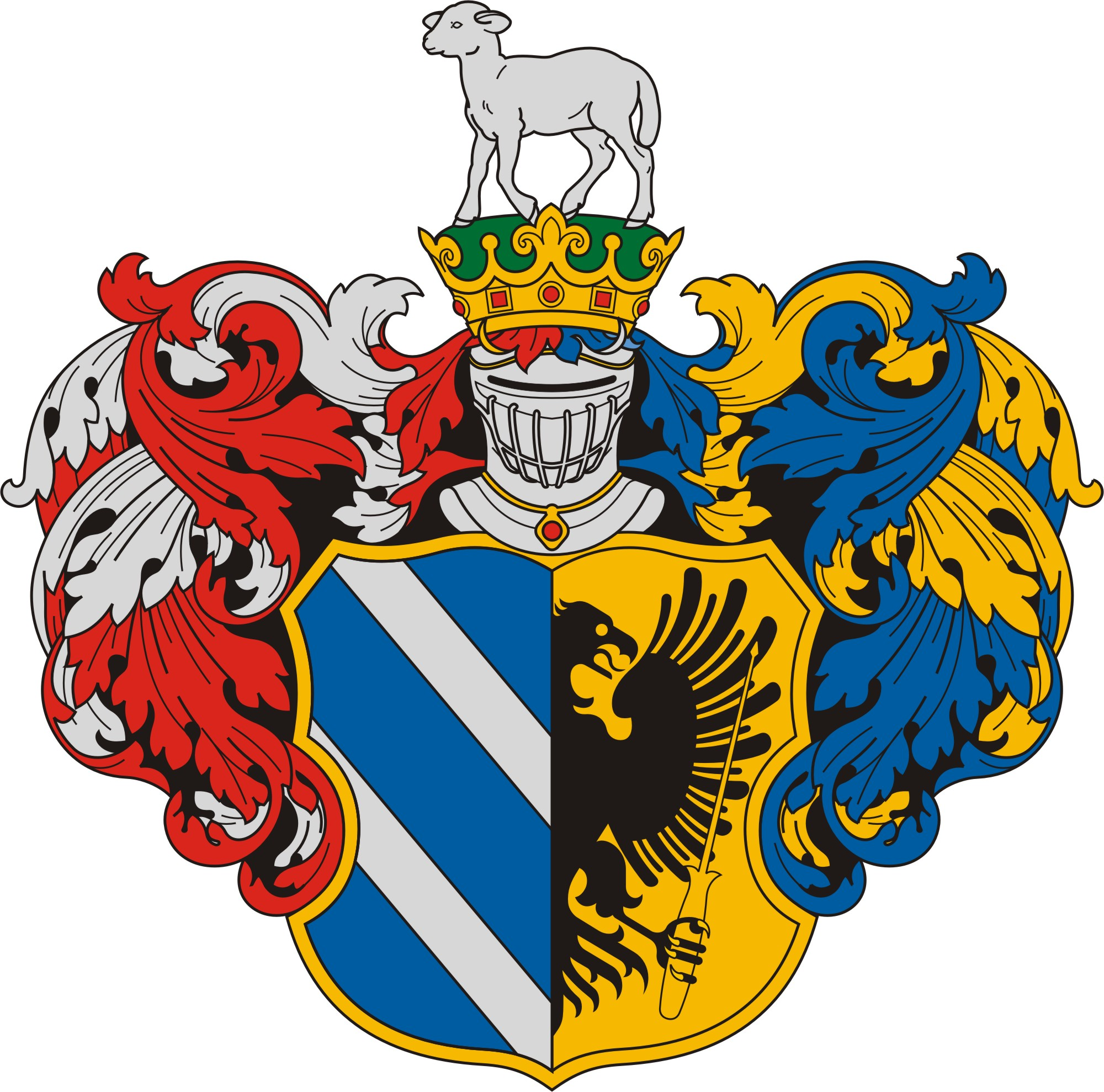 A város kiváltságlevelében megfogalmazzák címerének leírását is: „álló, hasított katonai pajzs, jobb felén két folyó - a Tiszát és a Marost jelképezve - kék mezőben fut és folyik alá, a pajzs bal oldalán felezett sas kiterjesztett szárnnyal, lába karmával aranyos jogart tartva ezüst mezőben, természethűen lefestve látható … a pajzson épp csak ráhelyezett rostélyos vagy nyitott katonai sisak van királyi diadémmal és egy, a korong felett álló ezüstbárányt díszként elővezetve… a sisak csúcsáról innen (jobbról) ezüst és vörös, onnan (balról) pedig arany és kék foszlányokkal vagy szalagokkal” ékesített. Az eltérés a bal mező esetében szembeötlő, hogy ez mikor következett be, nincs adatunk rá, de az 1993-ban kiadott „Szeged város jelképeiről“ szóló közgyűlési rendeletben már úgy szerepel.